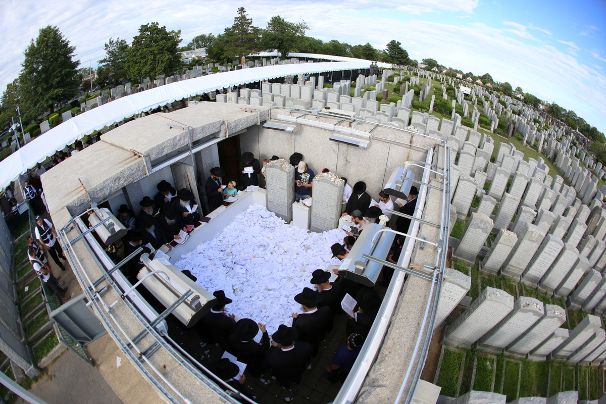 אוהל הרבי מליובאוויטש - מבט מלמעלה